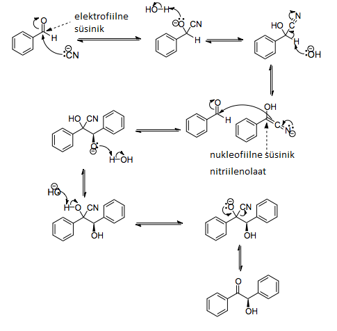 Bensoiinmehhanismi skeem